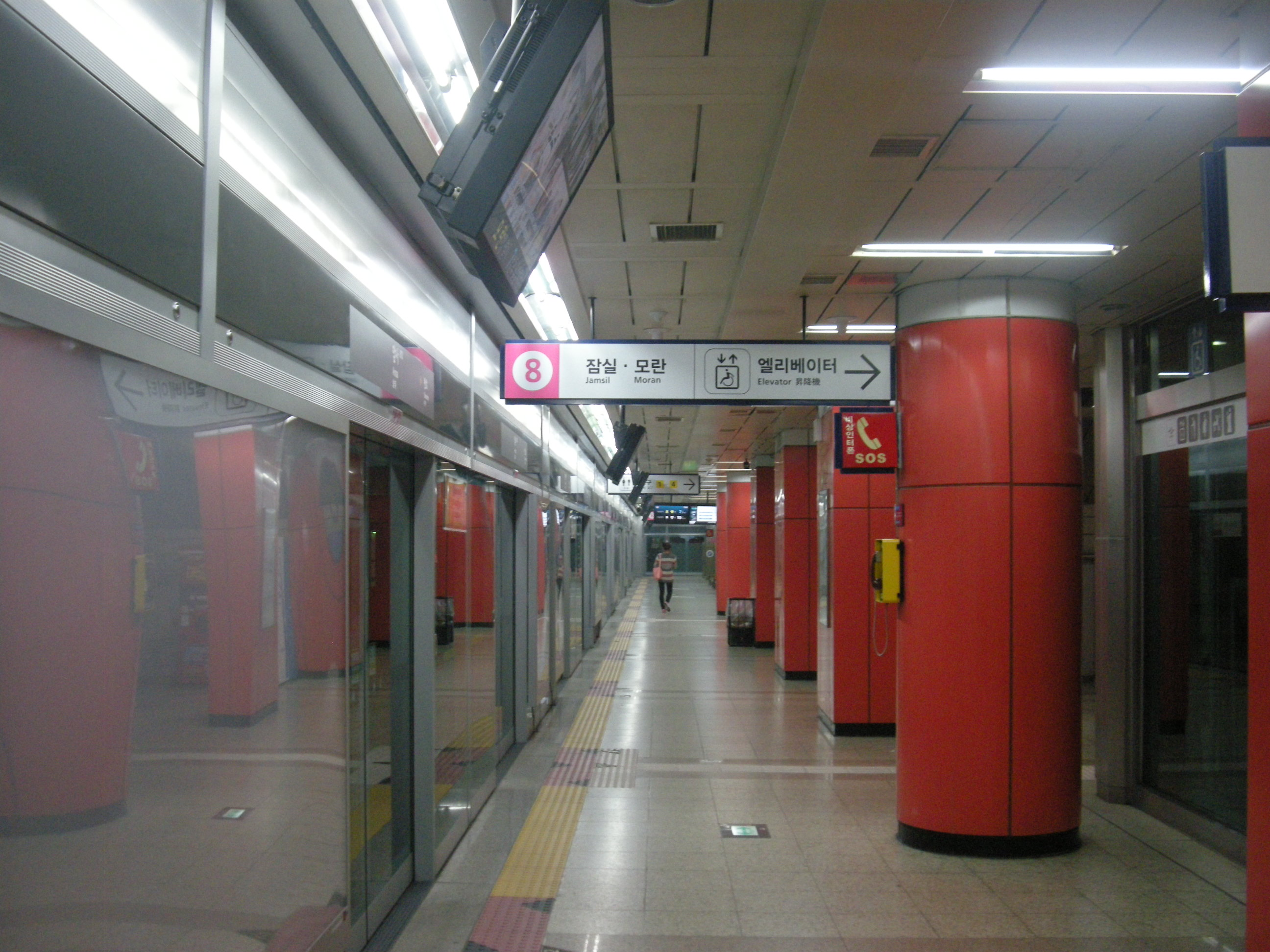 서울 지하철 8호선 암사역 모란 방면 승강장